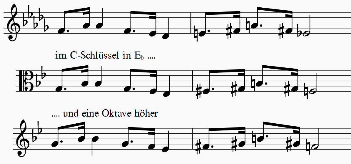 Transposition über den Bratschenschlüssel